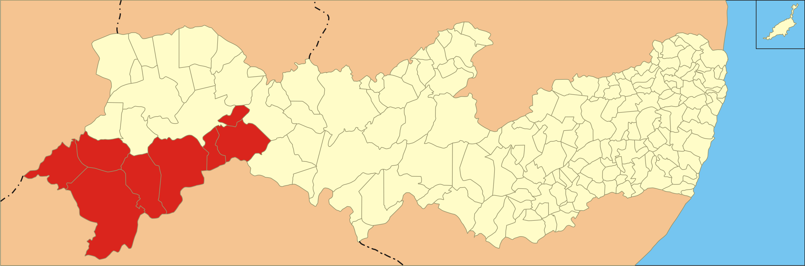 Localização da microrregião no estado de Pernambuco.